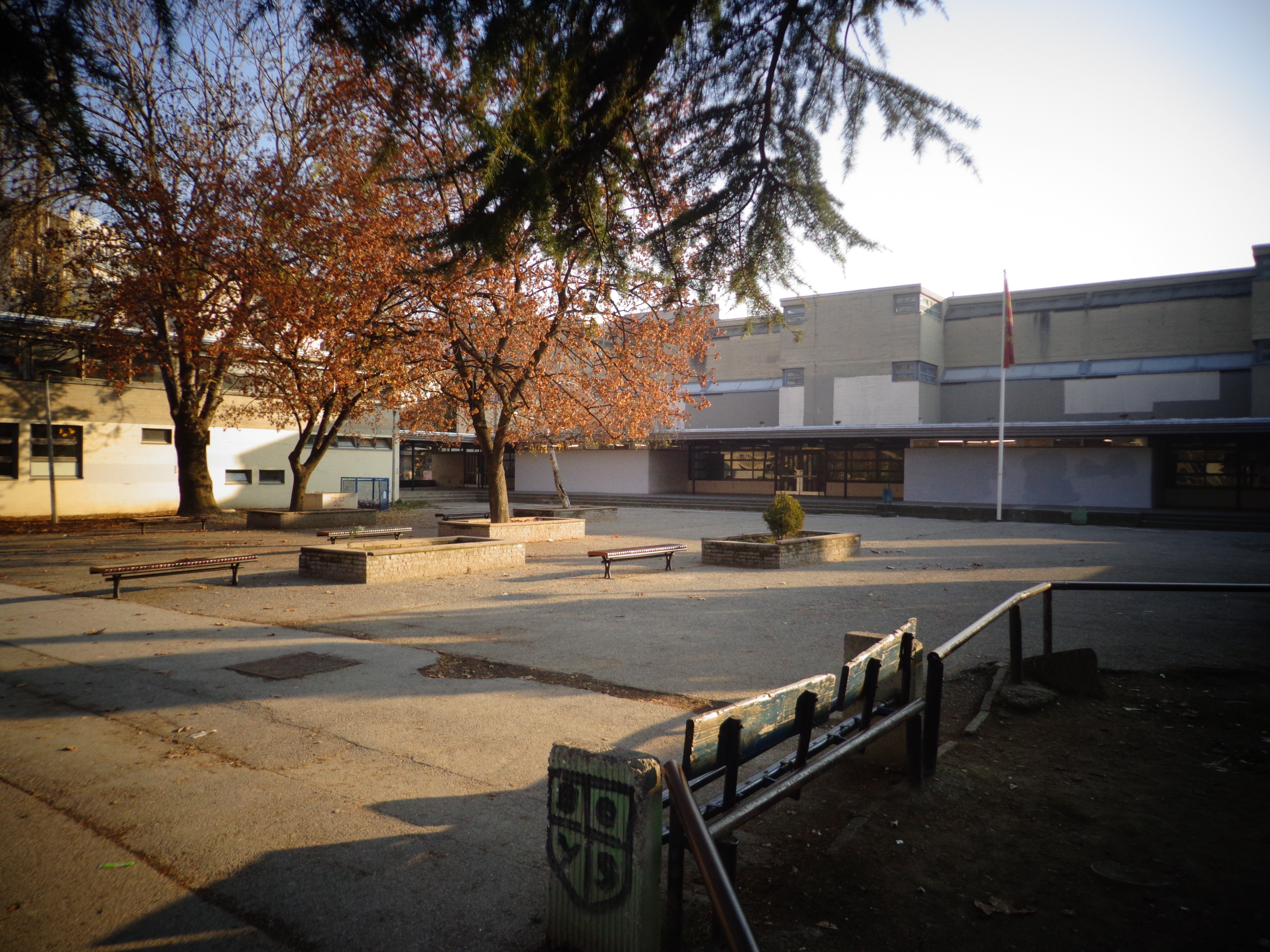 Skopje, Republic of Macedonia ( Elementary school "Johan Hajnrih Pestaloci" ) , Скопје/Скопље, Р. Македонија ( ОУ "Јохан Хајнрих Песталоци" )